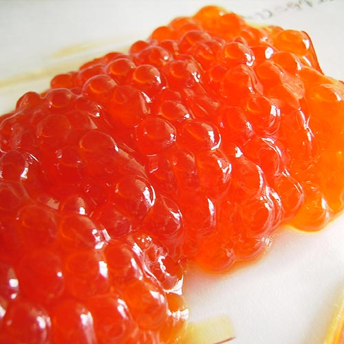 なんだかいくらとかすじこばかりたべてしまうのよねえ